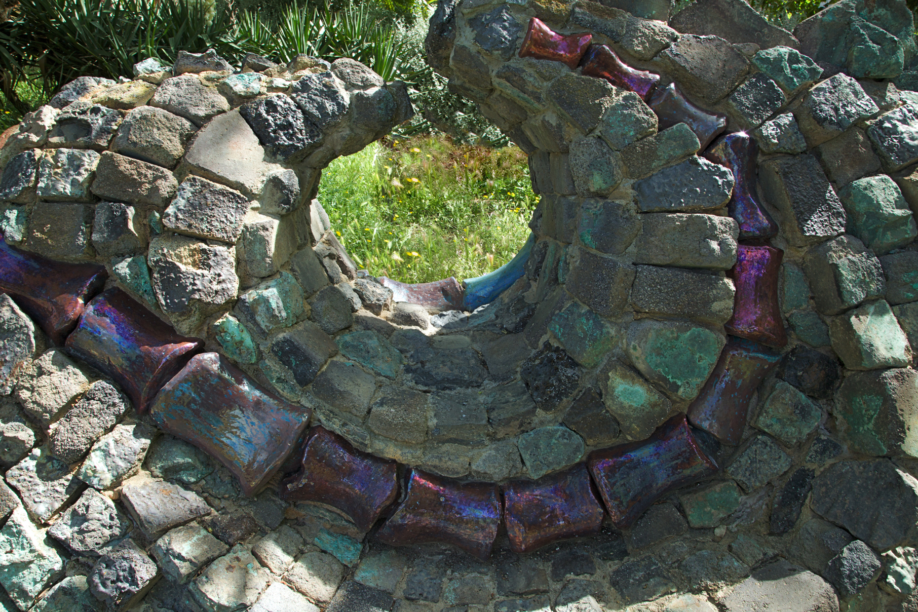 Marti Royo - Drac (detall) - Pl. Pujol - Vespella de Gaià